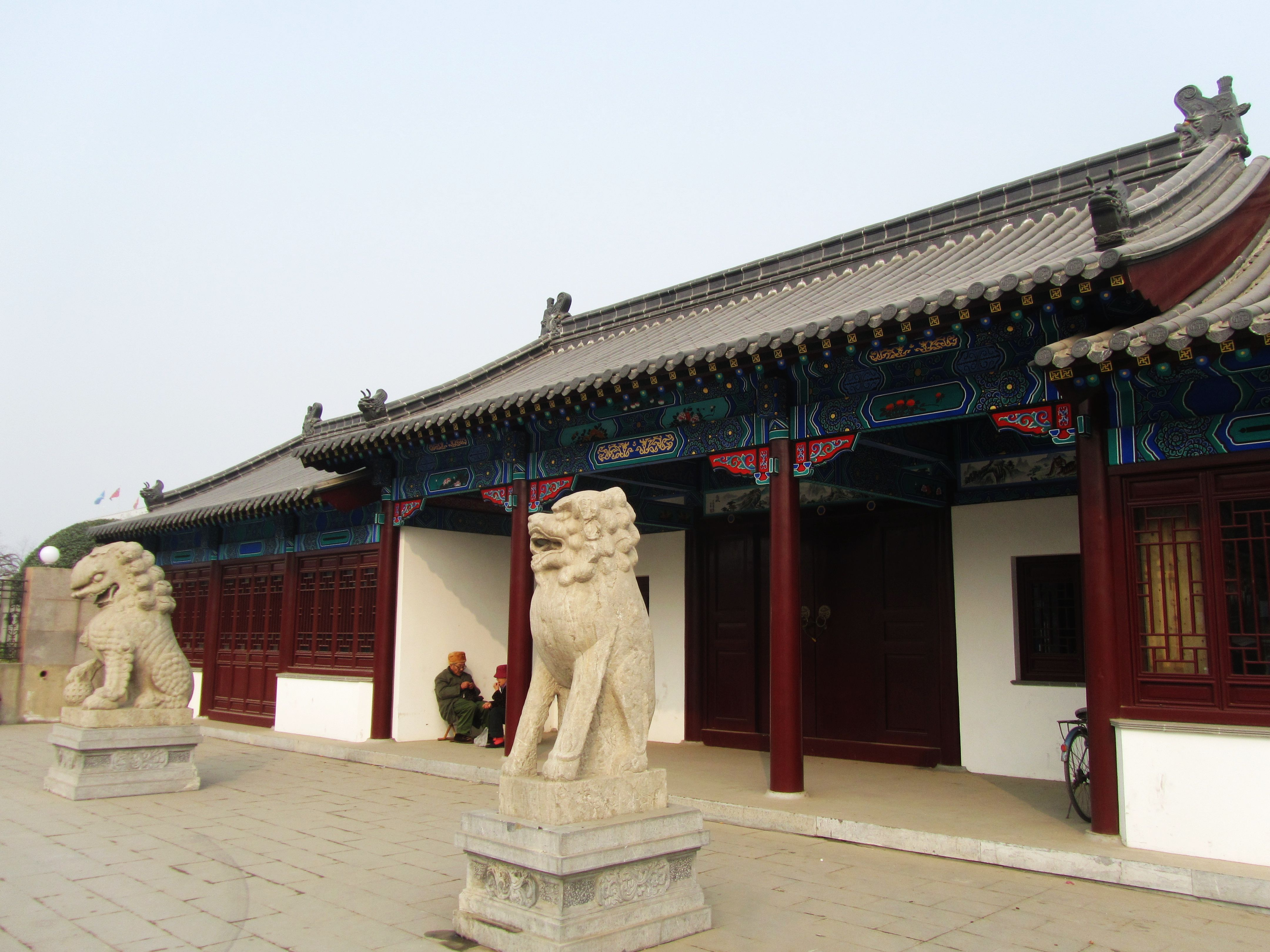 徐州乾隆行宫大门外侧。